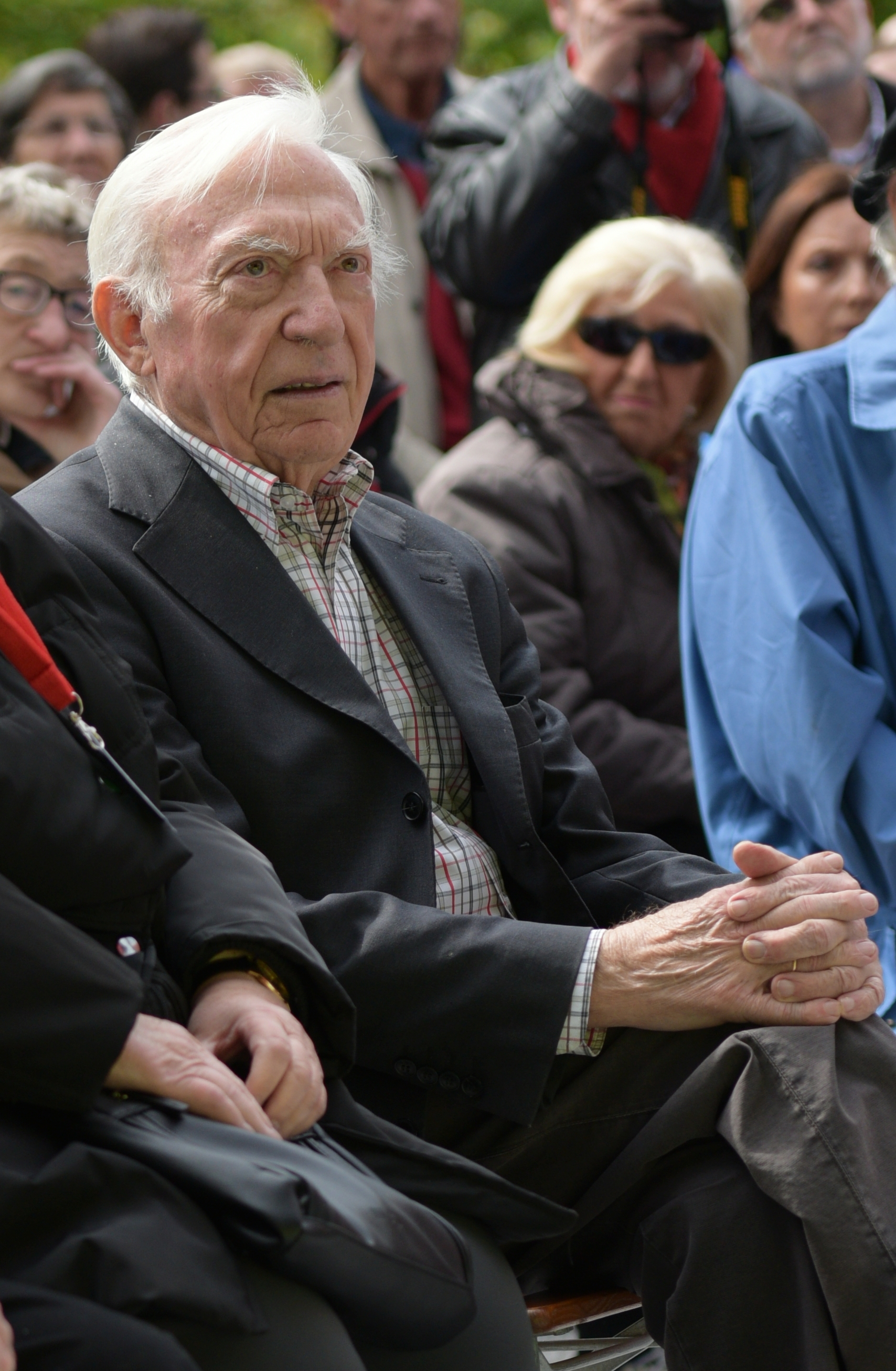 Kundgebung zum Tag der Arbeit 2015 im Landschaftspark Duisburg.